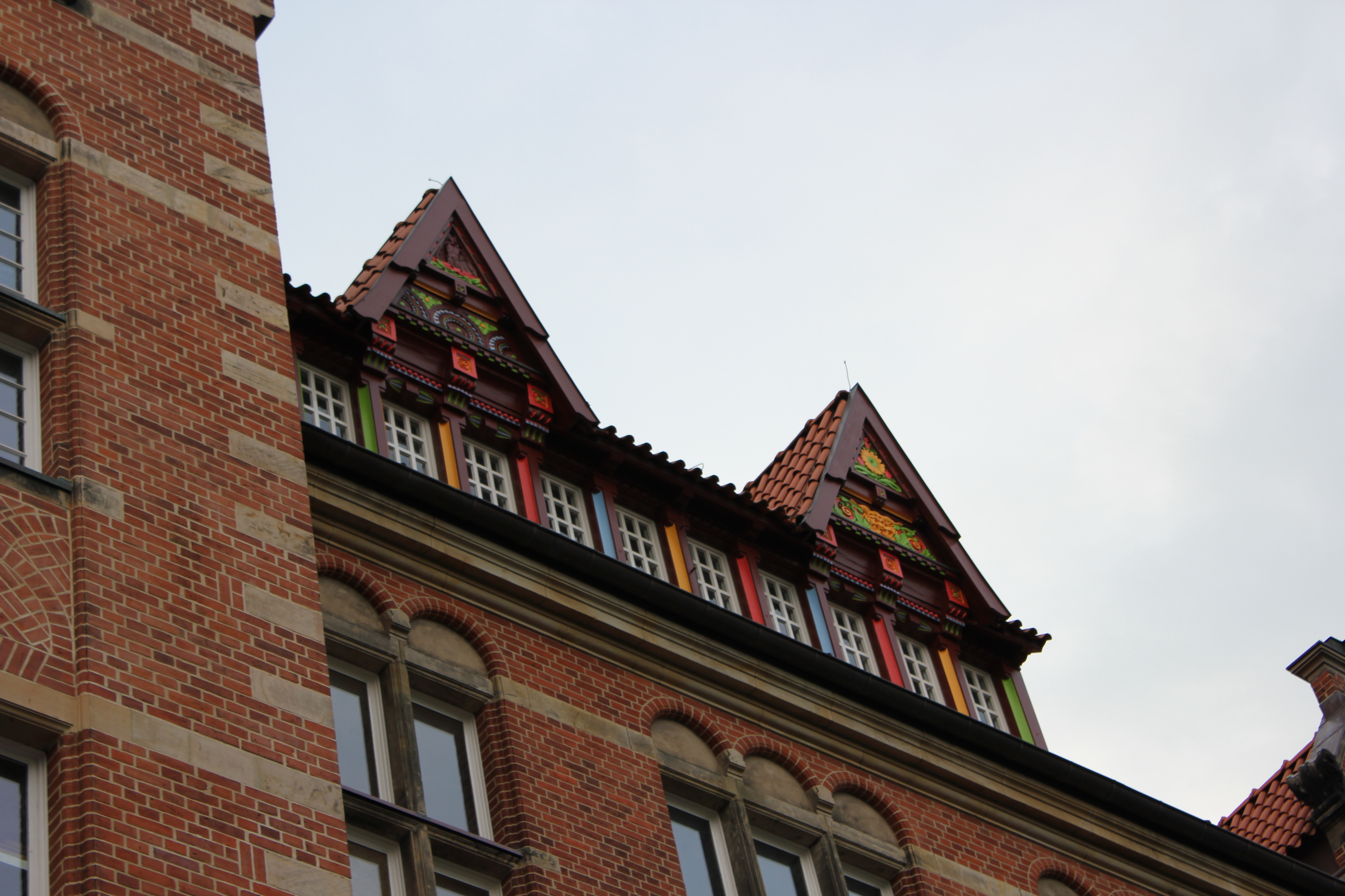 Dach des Heinrich-Sauermann-Hauses (Flensburg)